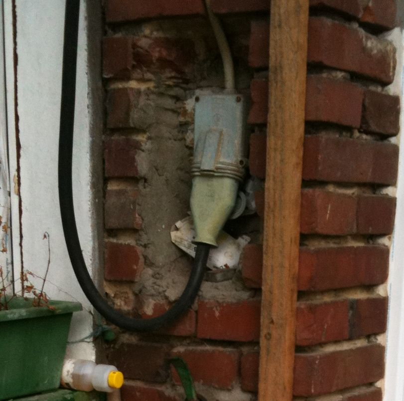 alte Kraftstromkupplung, Flachsteckvorrichtung: Kragenstecker und Buchse nach DIN 49450